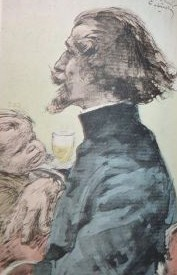 Portrait de Léon de Bercy